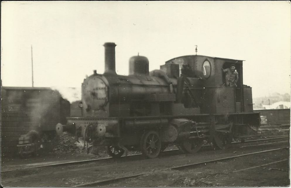 Saint-Quentin - Locomotive de la Compagnie des chemins de fer secondaires du Nord-Est (CFS-NE)